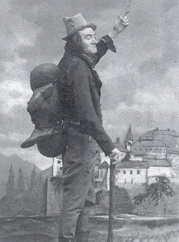 Johann Nepomuk Nestroy in seiner Paraderolle als "Knieriem" im "Lumpazivagabundus"